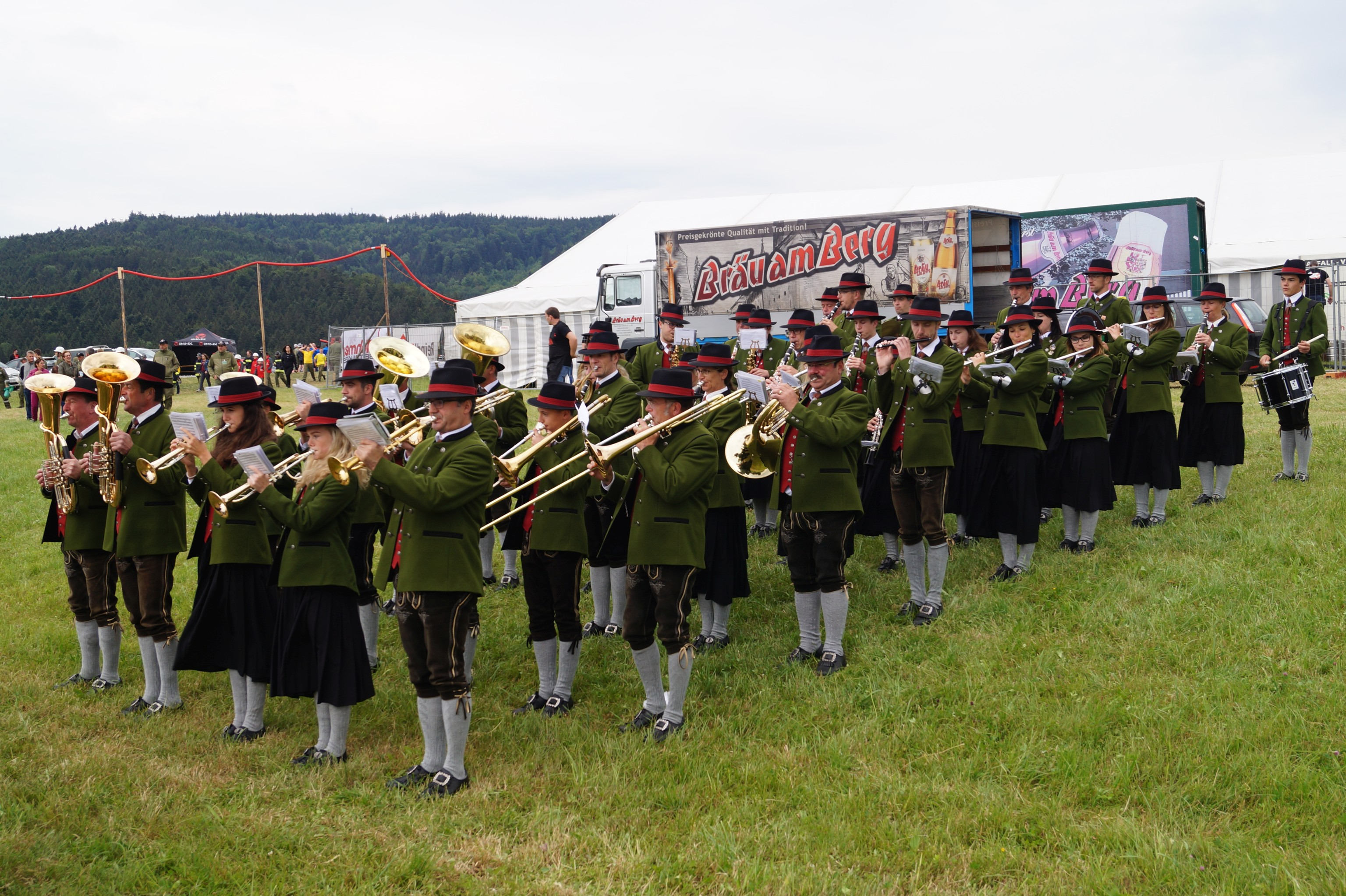 Musikapelle Weißenkirchen bei einer Feuerwehrveranstaltung in Weißenkirchen